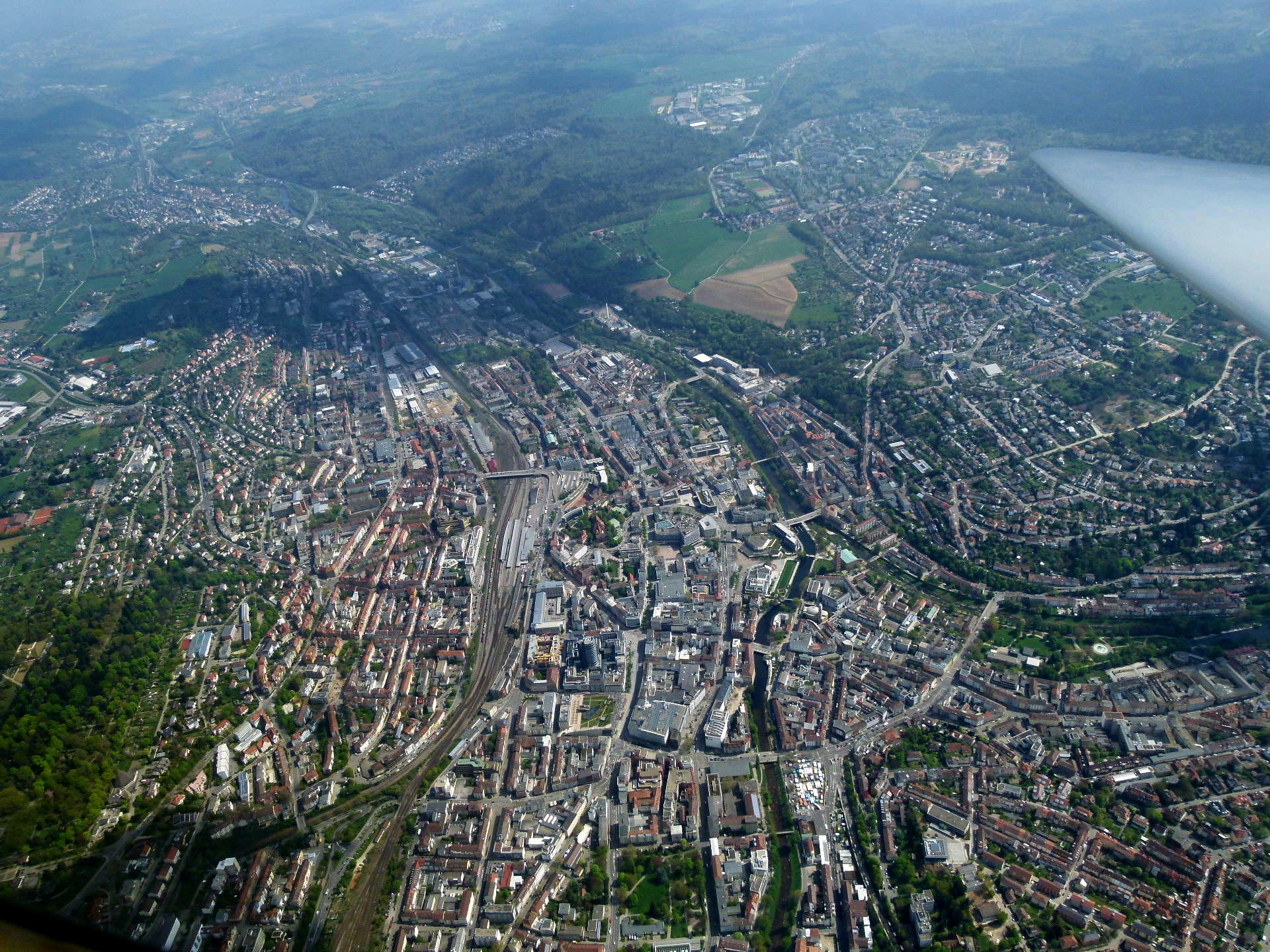 Luftbild von Pforzheim. Östliche Blickrichtung